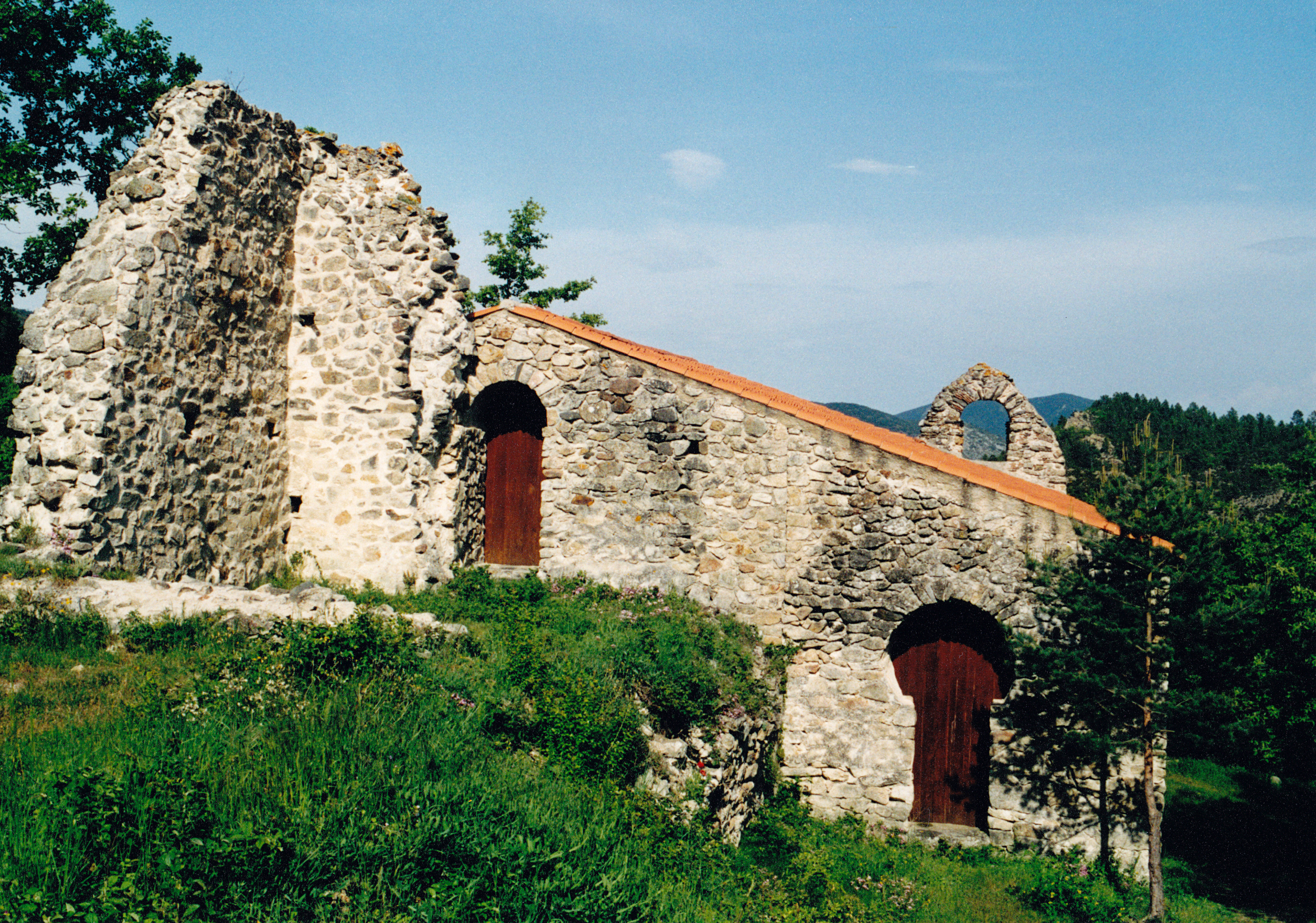 France - Fenouillèdes - Saint-Michel de Sournia (préroman) .